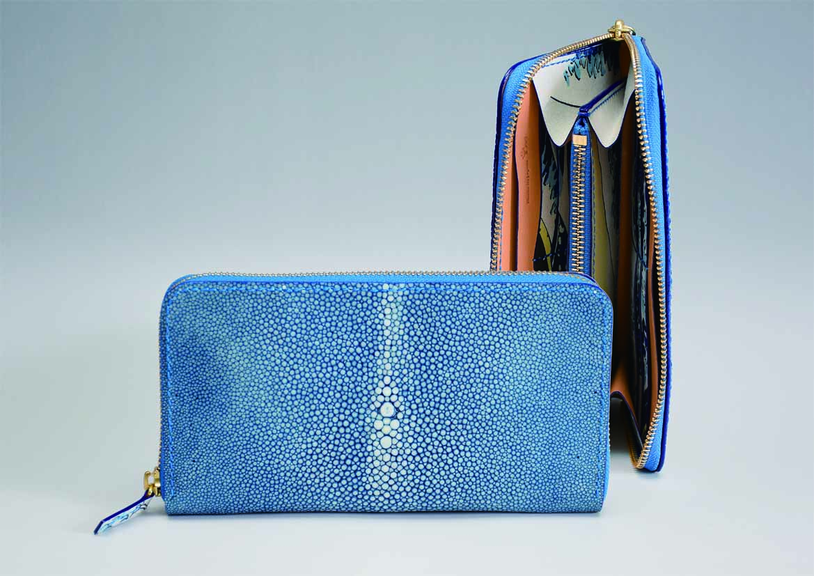 藍染のエイ革と内装には富嶽三十六景を手刷りした作品「富嶽三十六景」